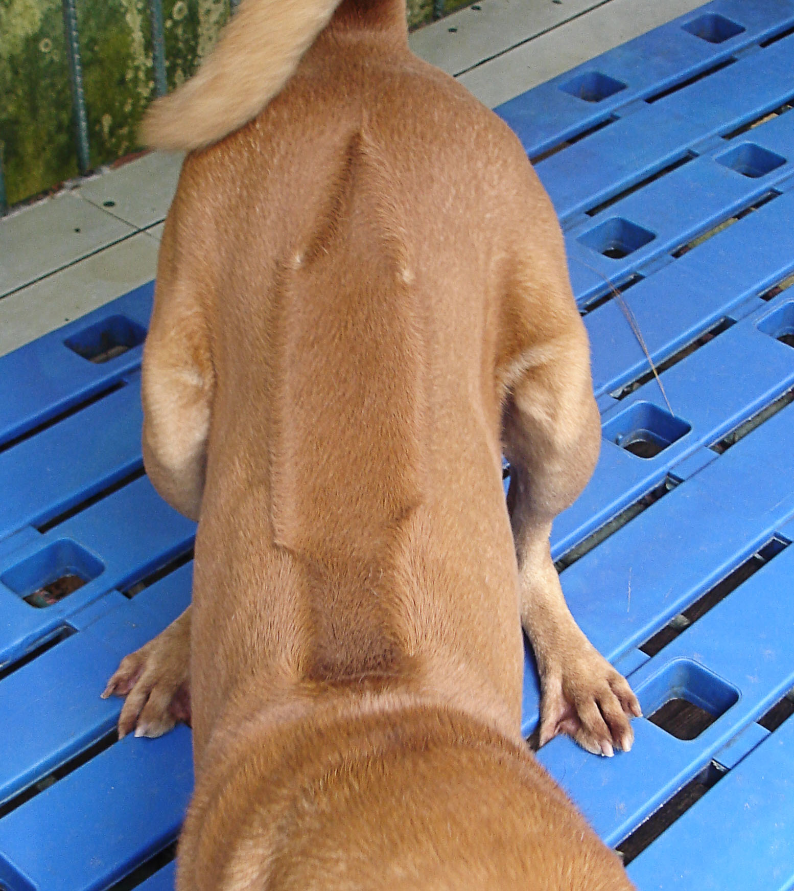 Đặc điểm nhận dạng chó Phú Quốc là có xoáy trên lưng và chân có màng như chân vịt